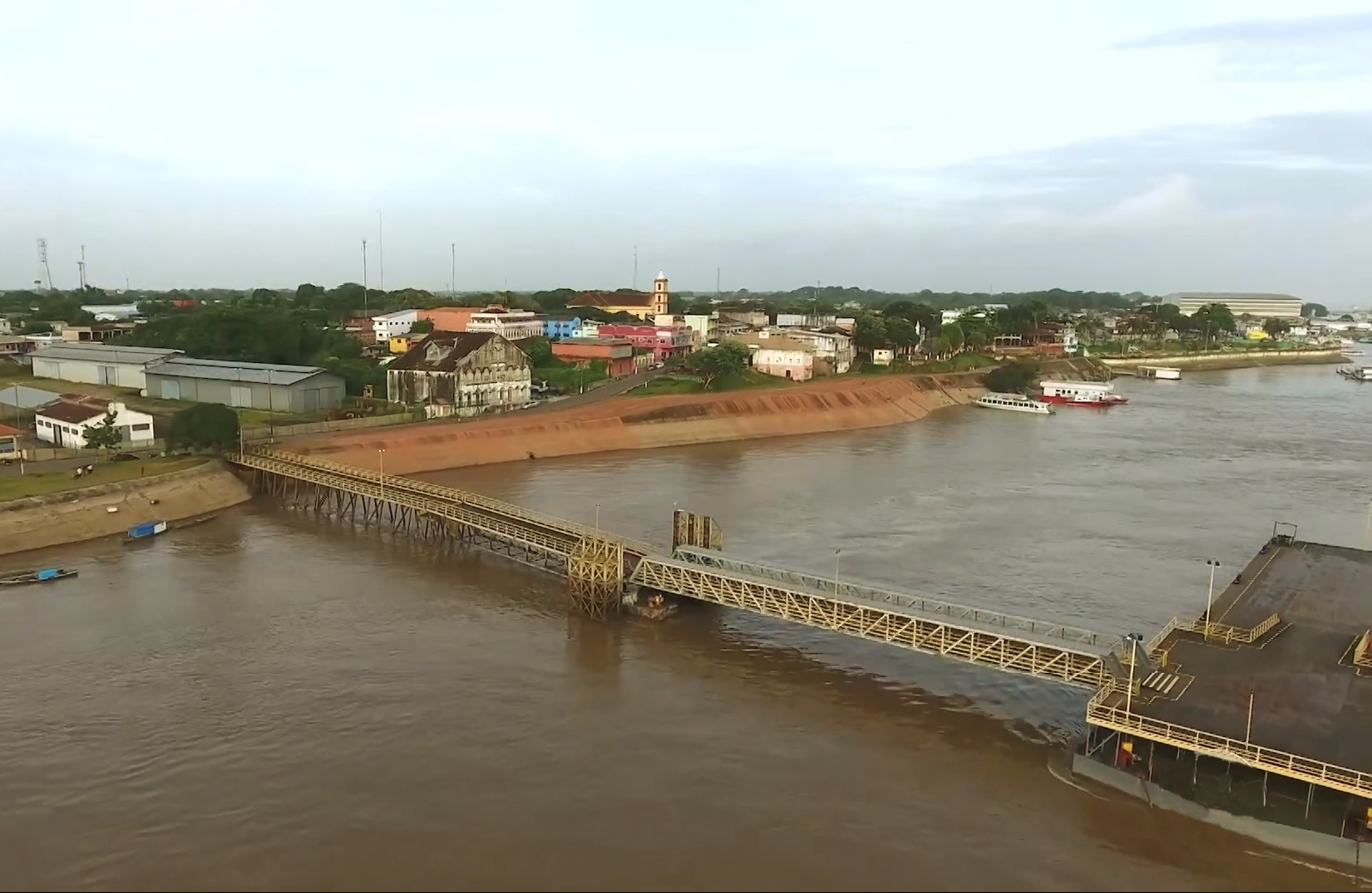 Porto de Itacoatiara, no Estado do Amazonas, Brasil.